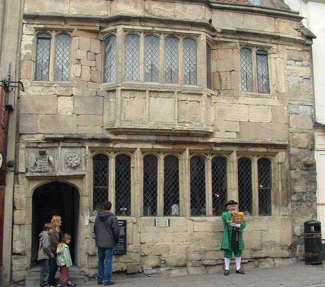 Oyez Oyez